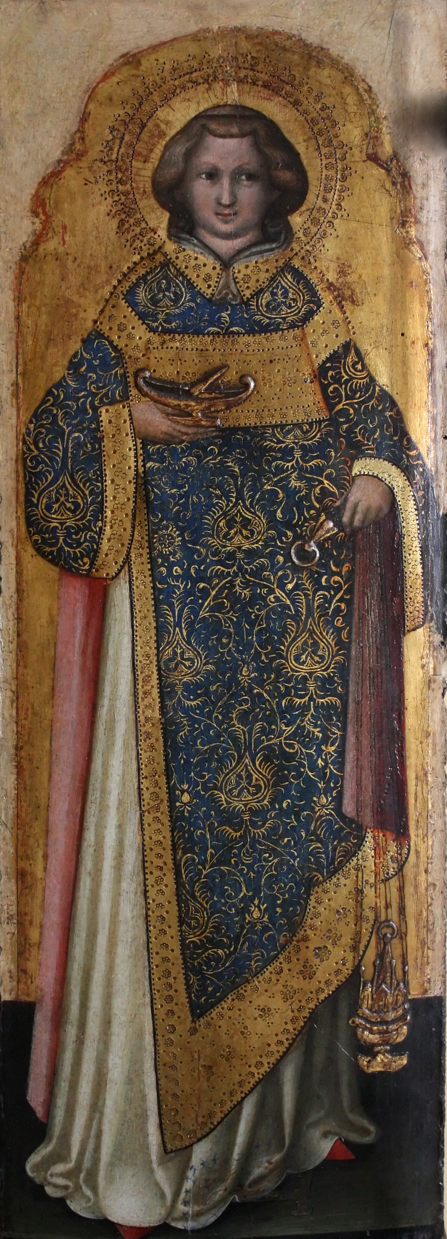 Saint Lawrencelabel QS:Lit,"San Lorenz" label QS:Lfr,"Saint Laurent" label QS:Len,"Saint Lawrence"